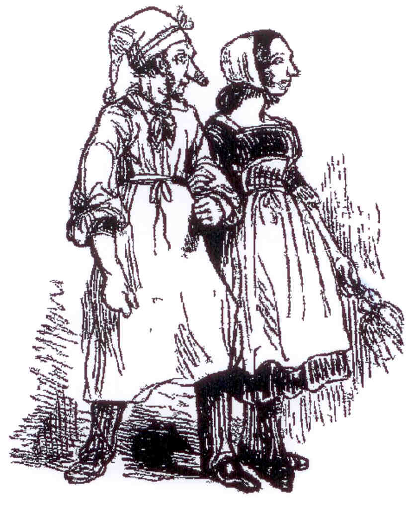 Un couple de Parisiens en Carnaval à Paris en 1842.